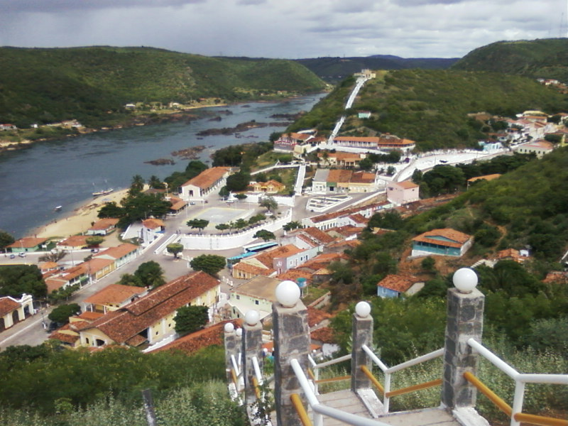 Foto da cidade de Piranhas, estado de Alagoas, Nordeste Brasileiro